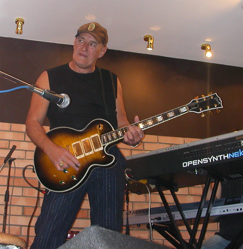 Jan Akkerman, a Dutch guitarist in Arkhangelsk, Russia.